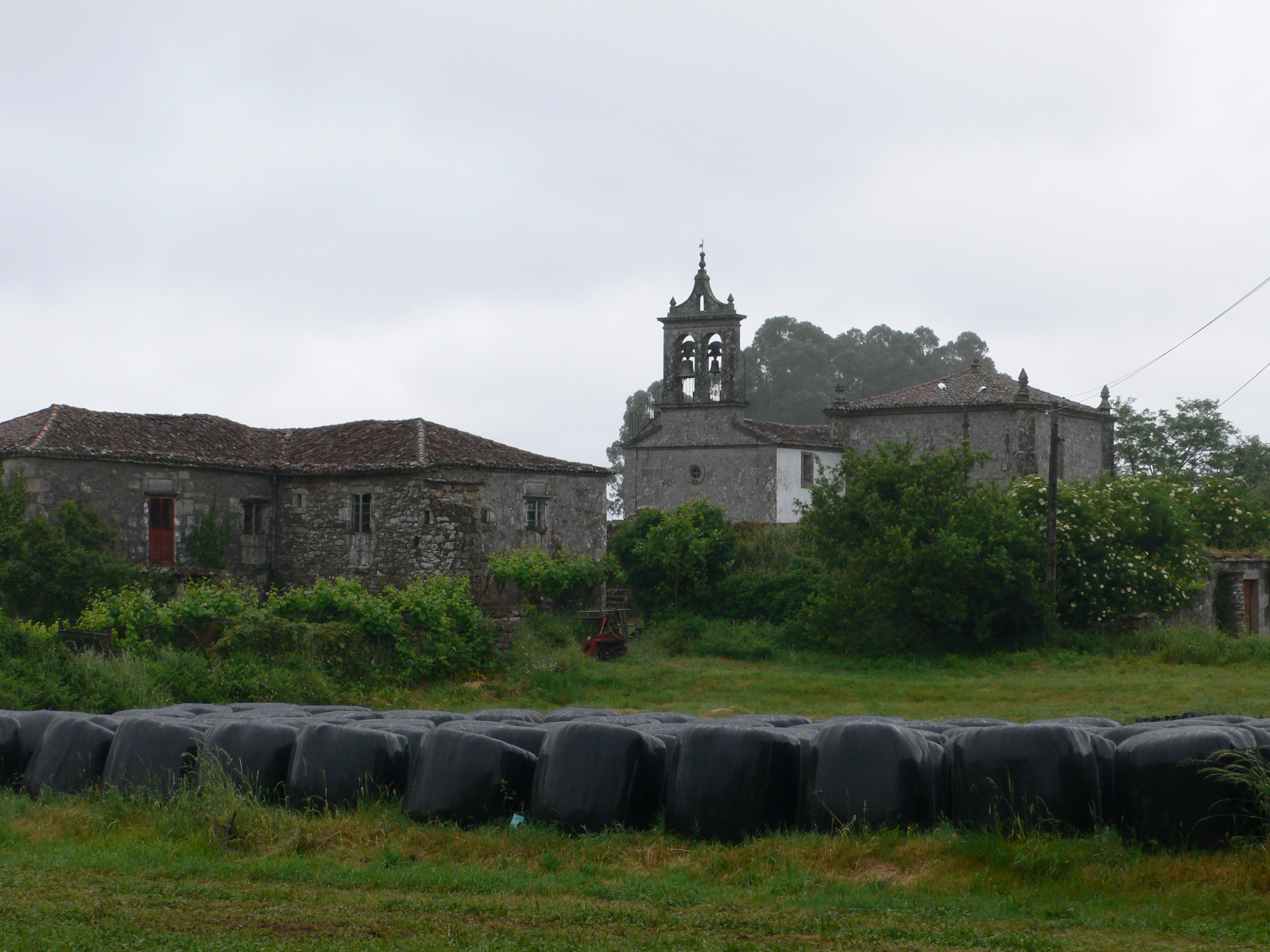 Casa reitoral e igrexa de Cervaña, Silleda